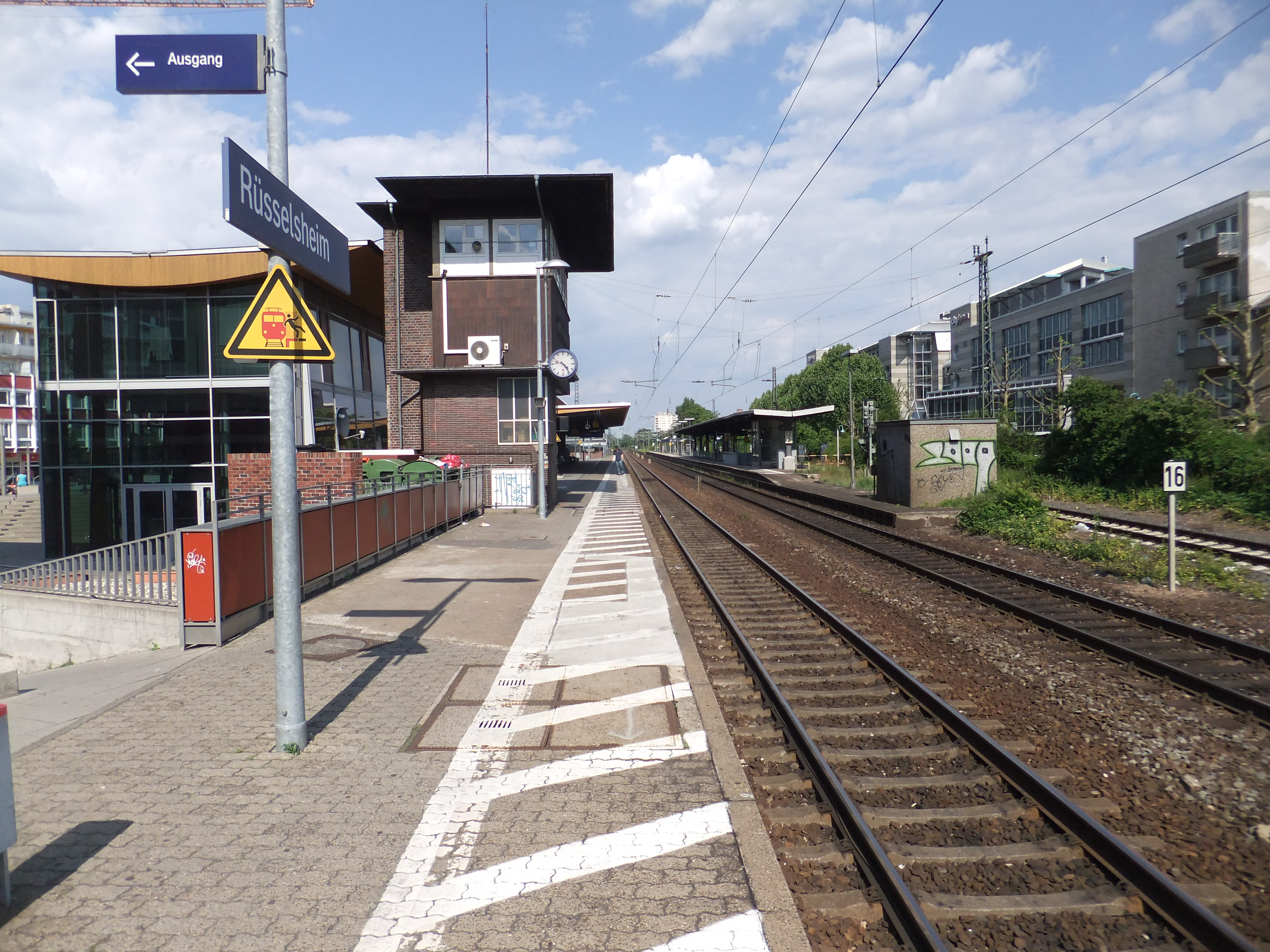 Der Rüsselsheimer Bahnhof auf der Mainbahn